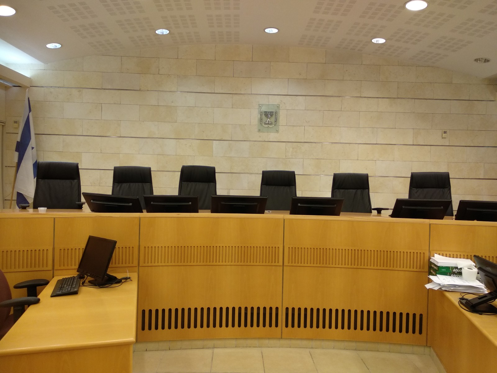 כסאות המוטב באולם הדיונים הגדול בבית הדין הארצי לעבודה בירושלים